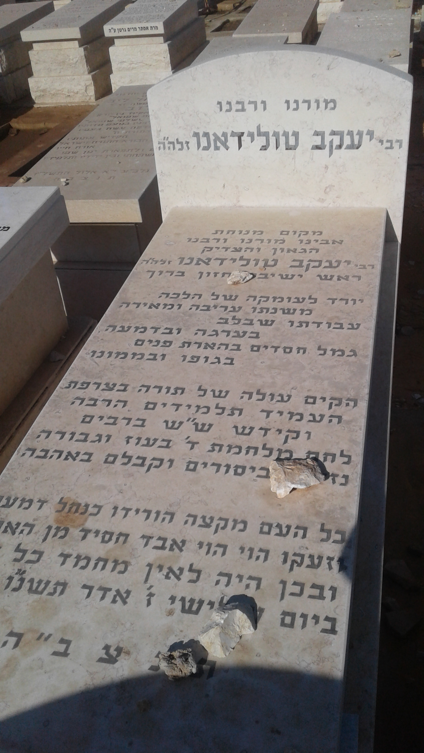 הרב יעקב טולדנו